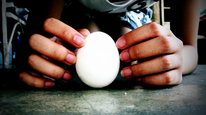 中文（香港）: 端午節立蛋